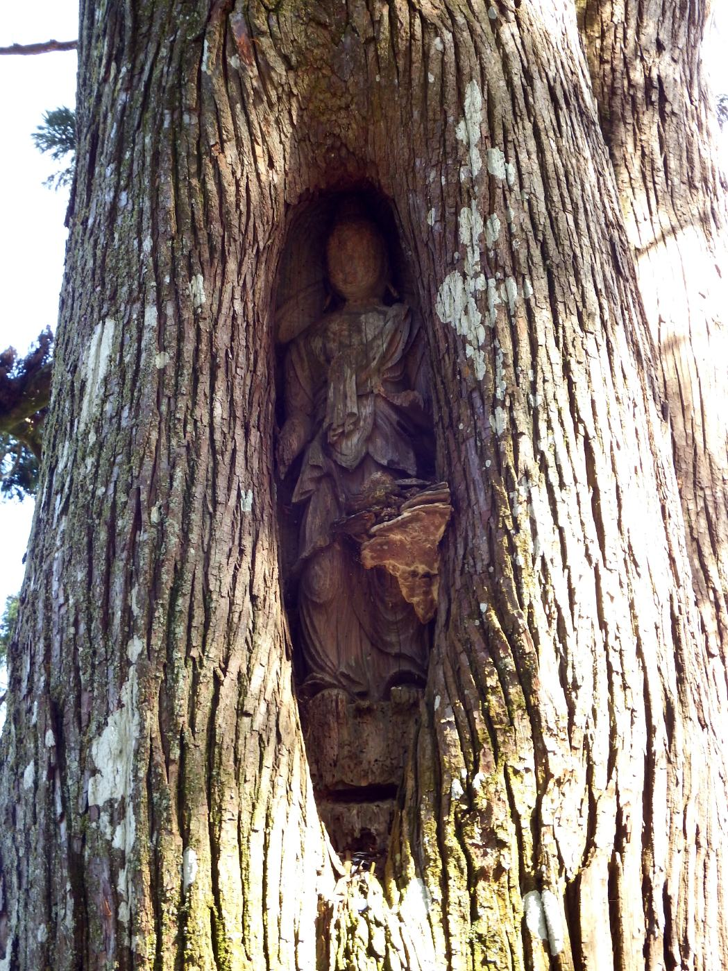 如意輪寺の立木観音